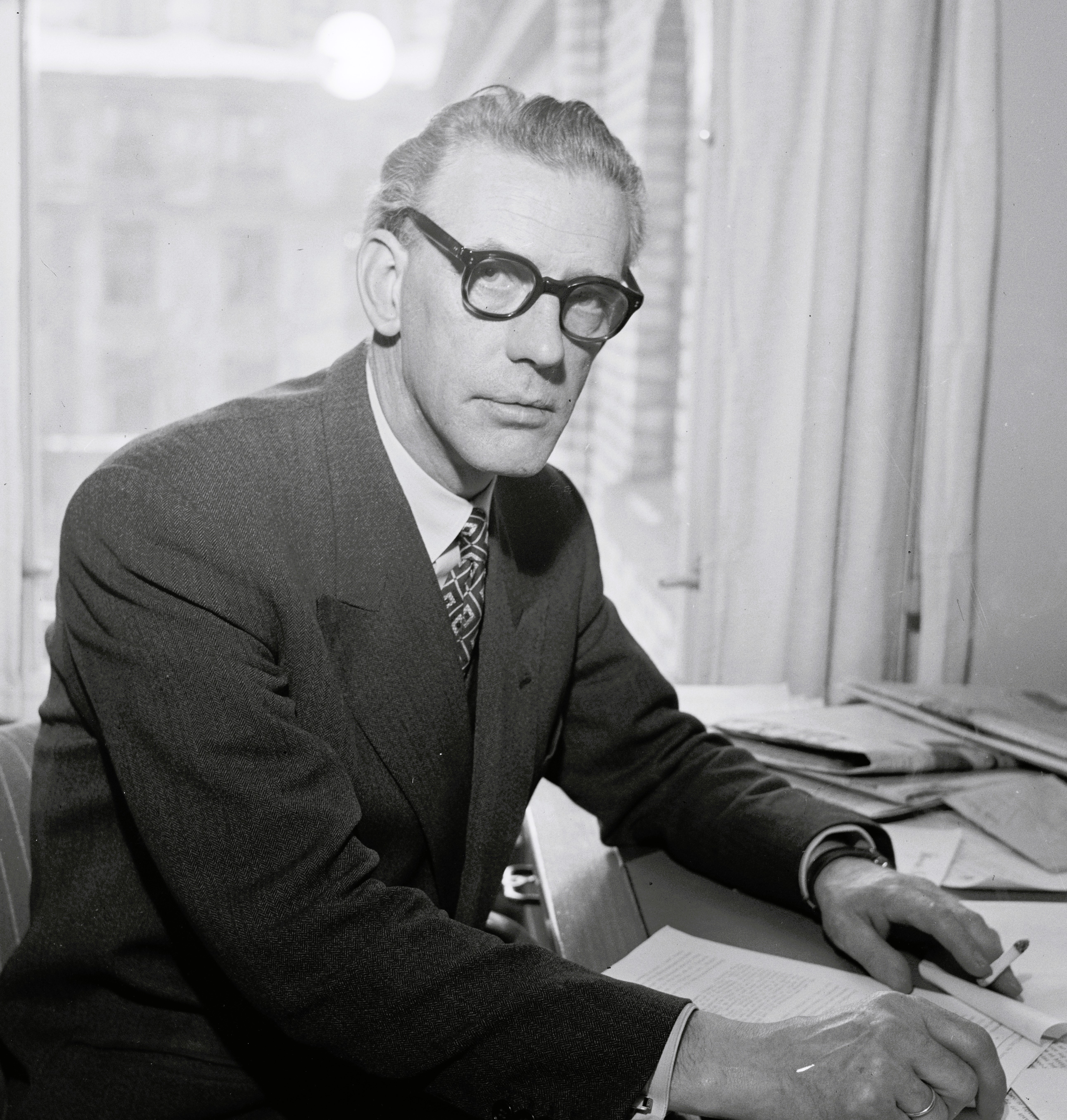 Bildet er hentet fra Arkivverket. Erling Fredriksfryd, stortingsmann for Høyre siden 1945, hjemsted Halden.nr. 5,1954. Arkivinstitusjon : Riksarkivet Arkivnavn : Billedbladet NÅ Sted : Norge, Oslo, Oslo, Stortinget Avbildet